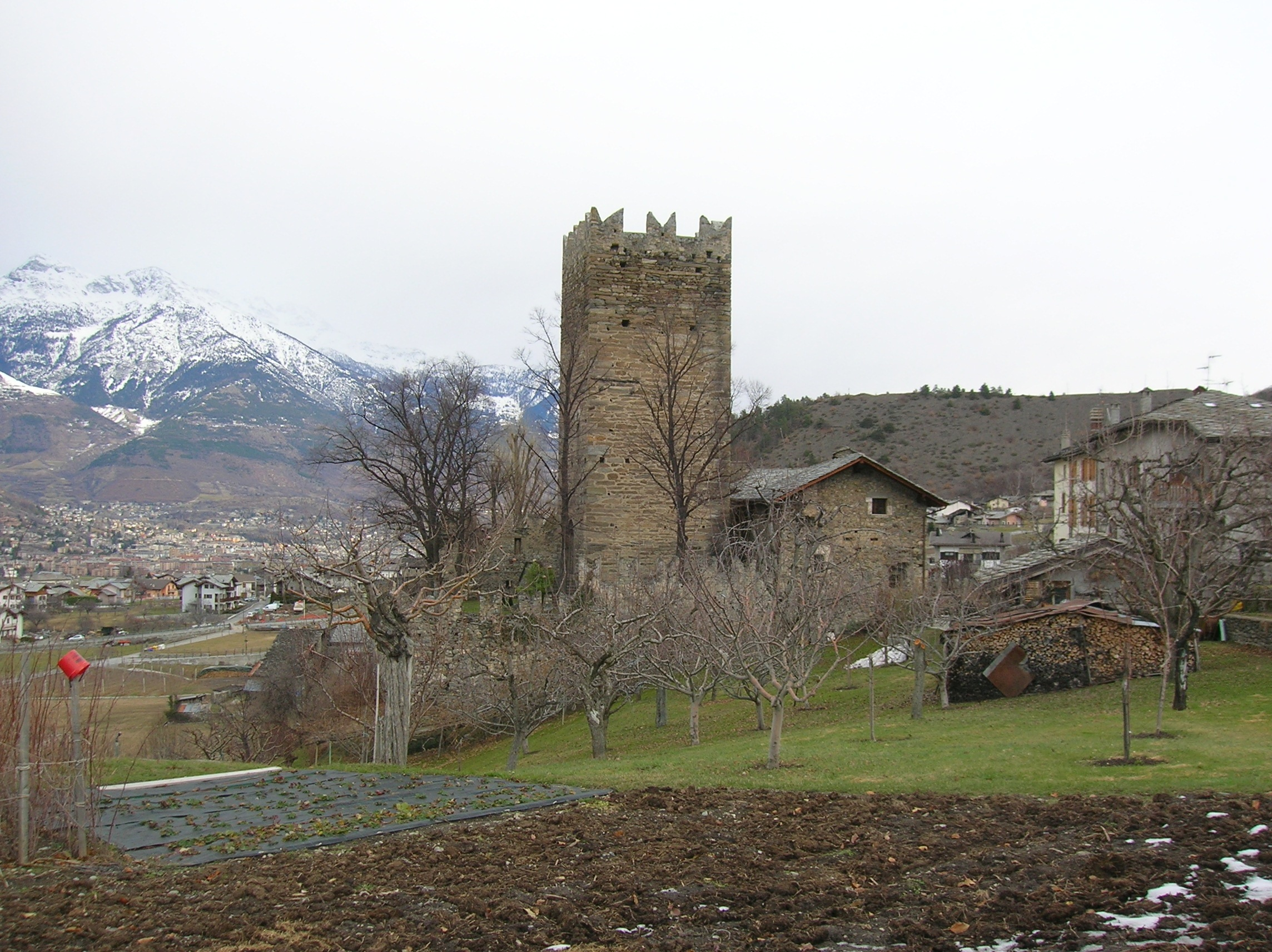 Lato ovest (lievemente nord-ovest) del Castello di Tour de Ville, Gressan, Valle d'Aosta Italia.